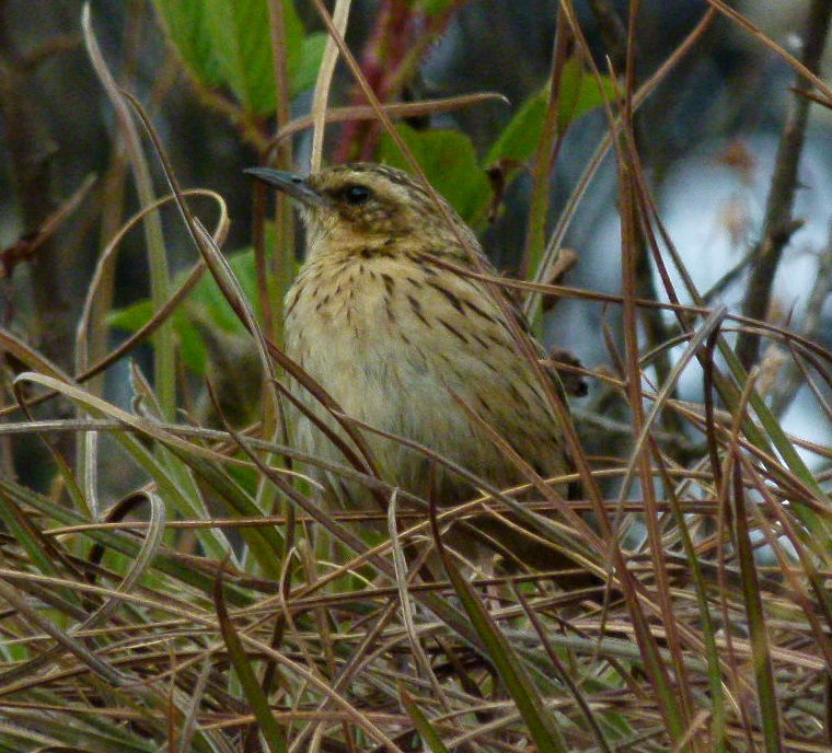 Anthus nilghiriensis, Upper Bhavani, Nilgiris